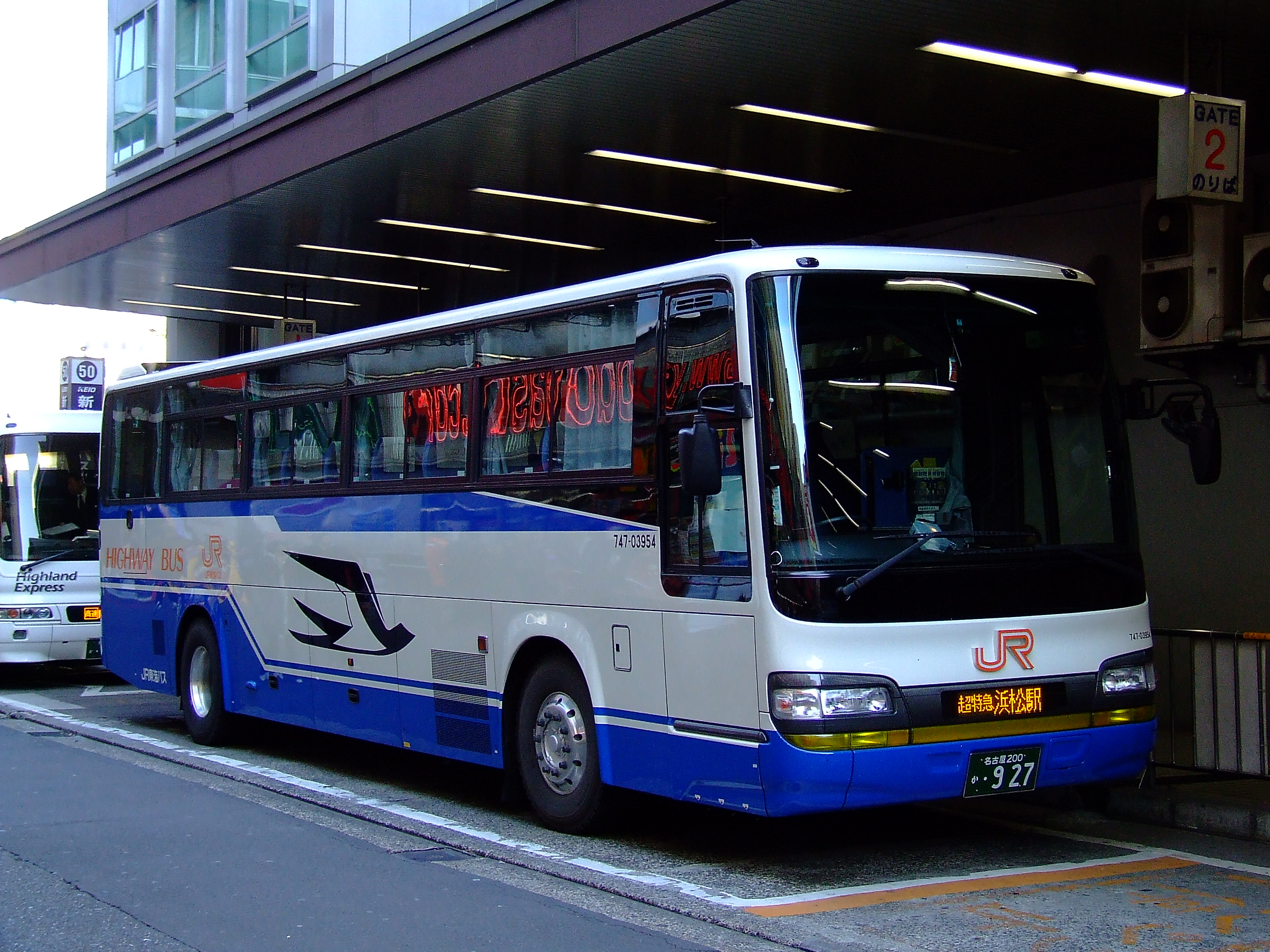 JR東海バスの高速バス「渋谷・新宿ライナー浜松号」 新宿高速バスターミナルにて